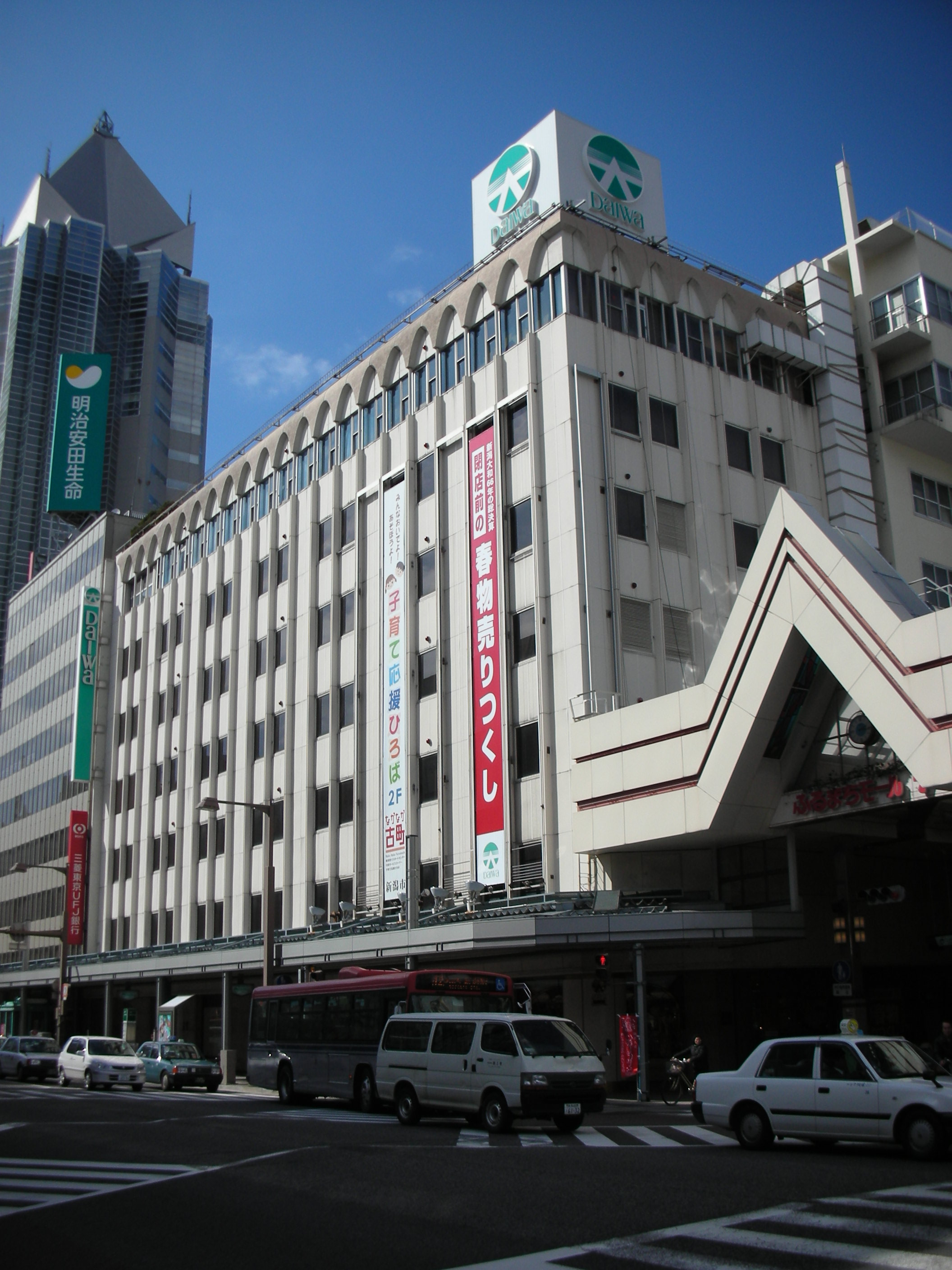 大和新潟店の外観